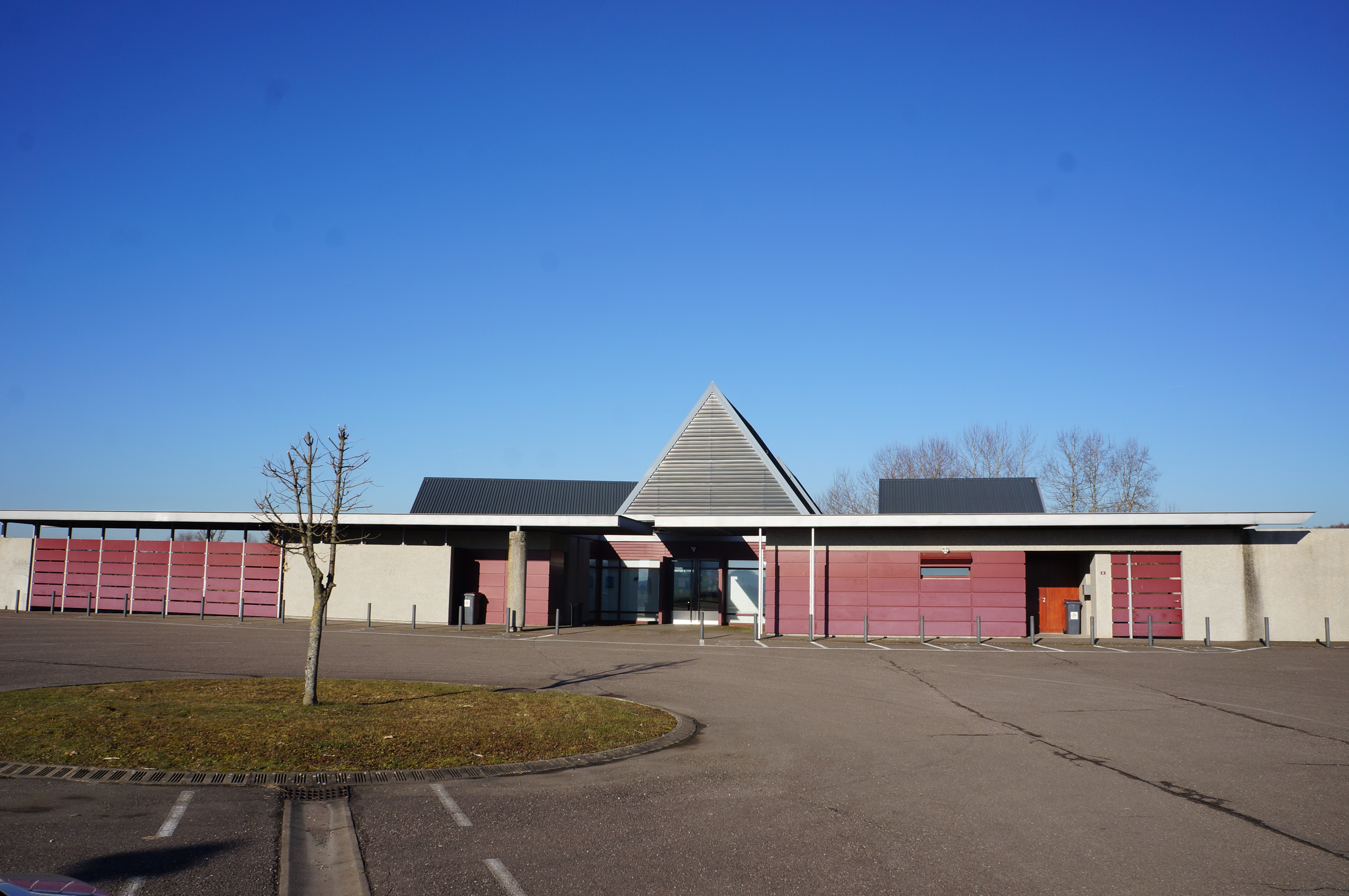 Le pôle Educatif des Vosges Saônoises.